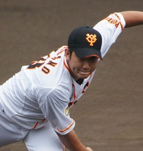 ジャイアンツ菅野投手